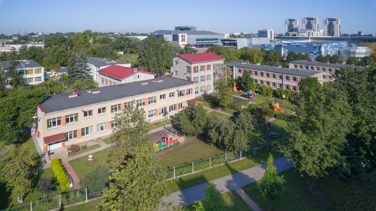 Rīgas 213 PII